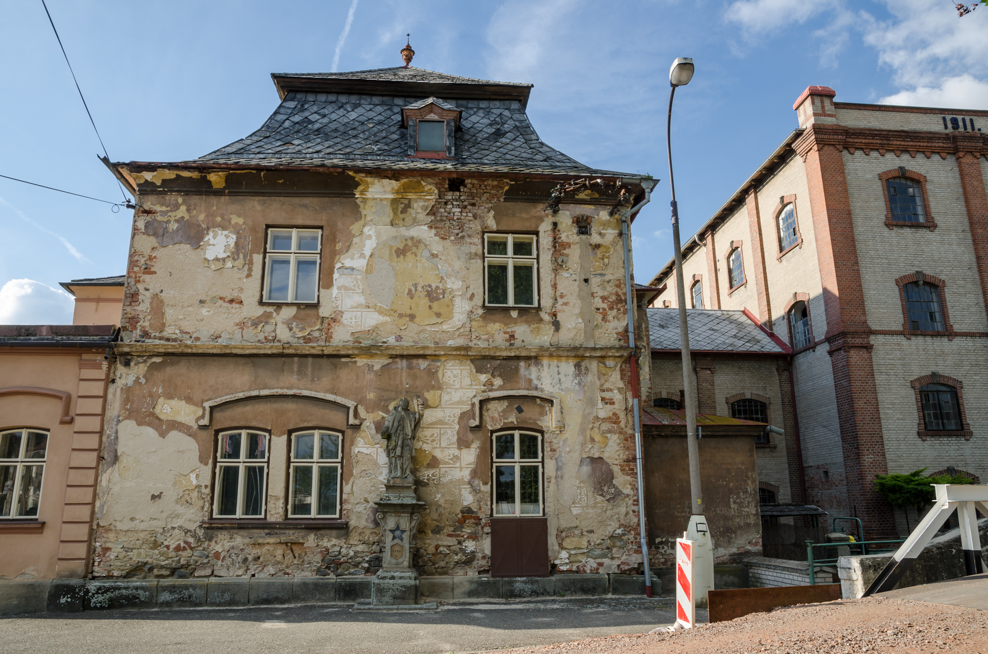 Vodní mlýn (Dašice), nároží Komenského a Štenclovy ul. 35, Dašice